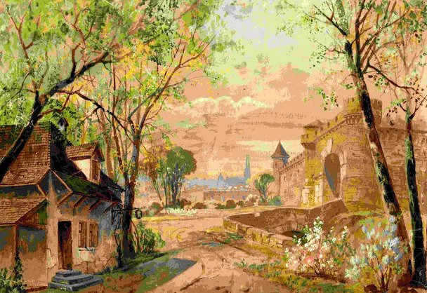 Spannraft Ágoston díszletterve, Gounod: Faust, Operaház